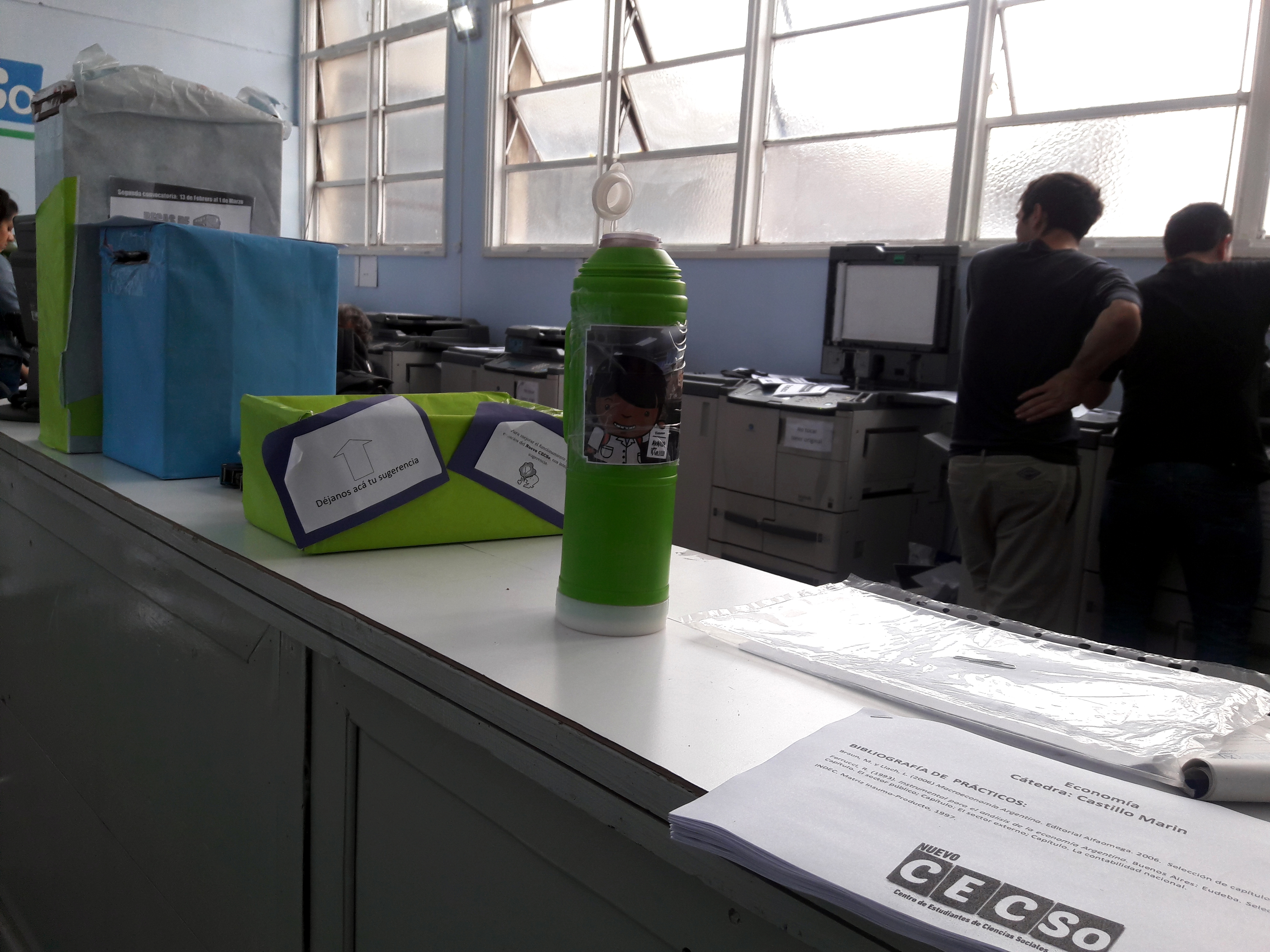 Fotocopiadora manejada por el Centro de Estudiantes, FSOC, UBA